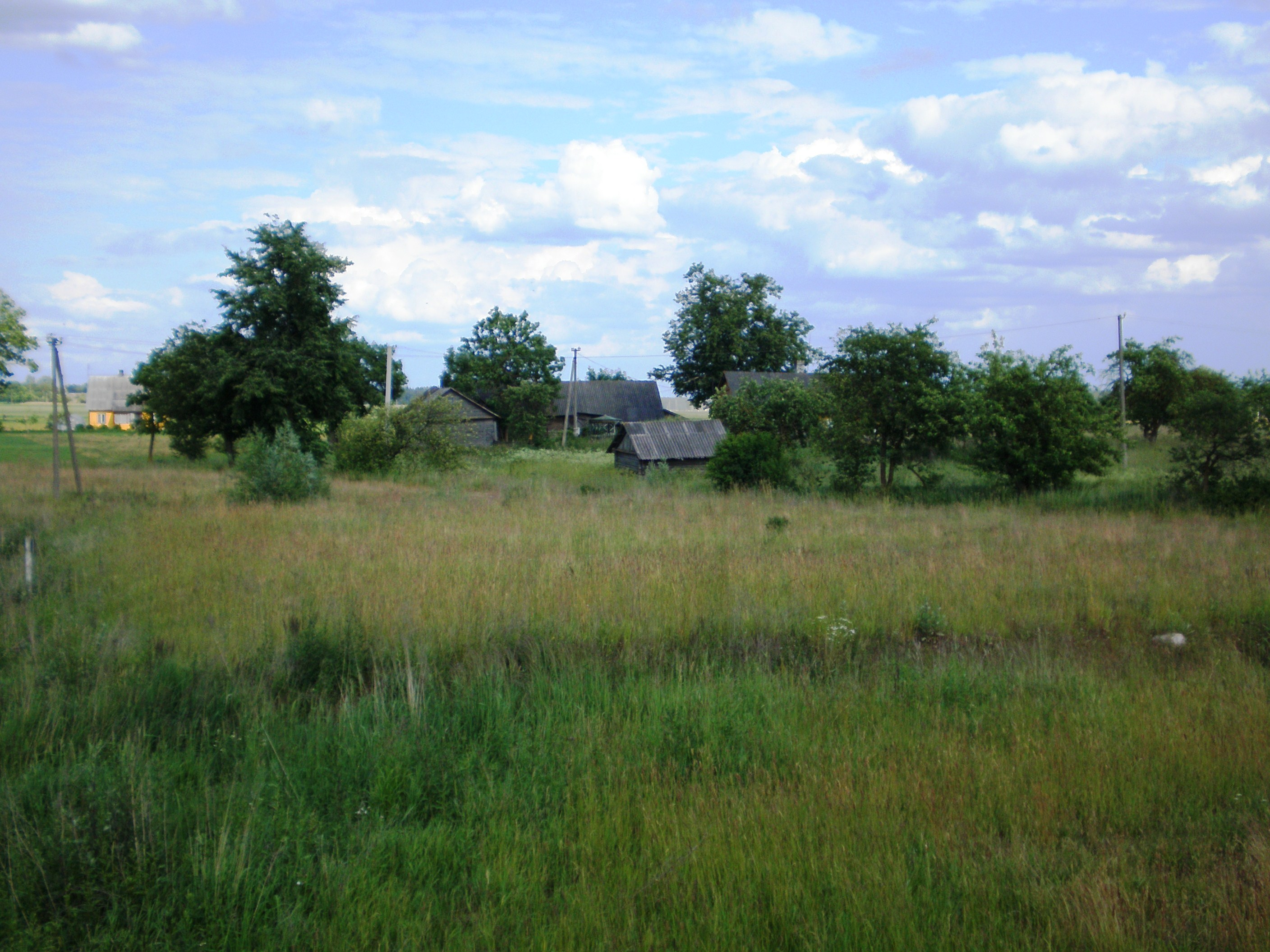 Stanioniai, Panevėžio raj.